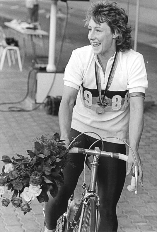 Christa Luding ADN-ZB Weisflog 7.7.88 Cottbus: DDR-Meisterschaften im Bahnradsport - Im 500-Meter-Zeitfahren der Frauen siegte die Eisschnellauf-Olympiasiegerin Christa Luding. Die Dresdnerin sicherte sich damit ihren 15. Meistertitel im Radsport und sorgte für ihren neunten DDR-Rekord.